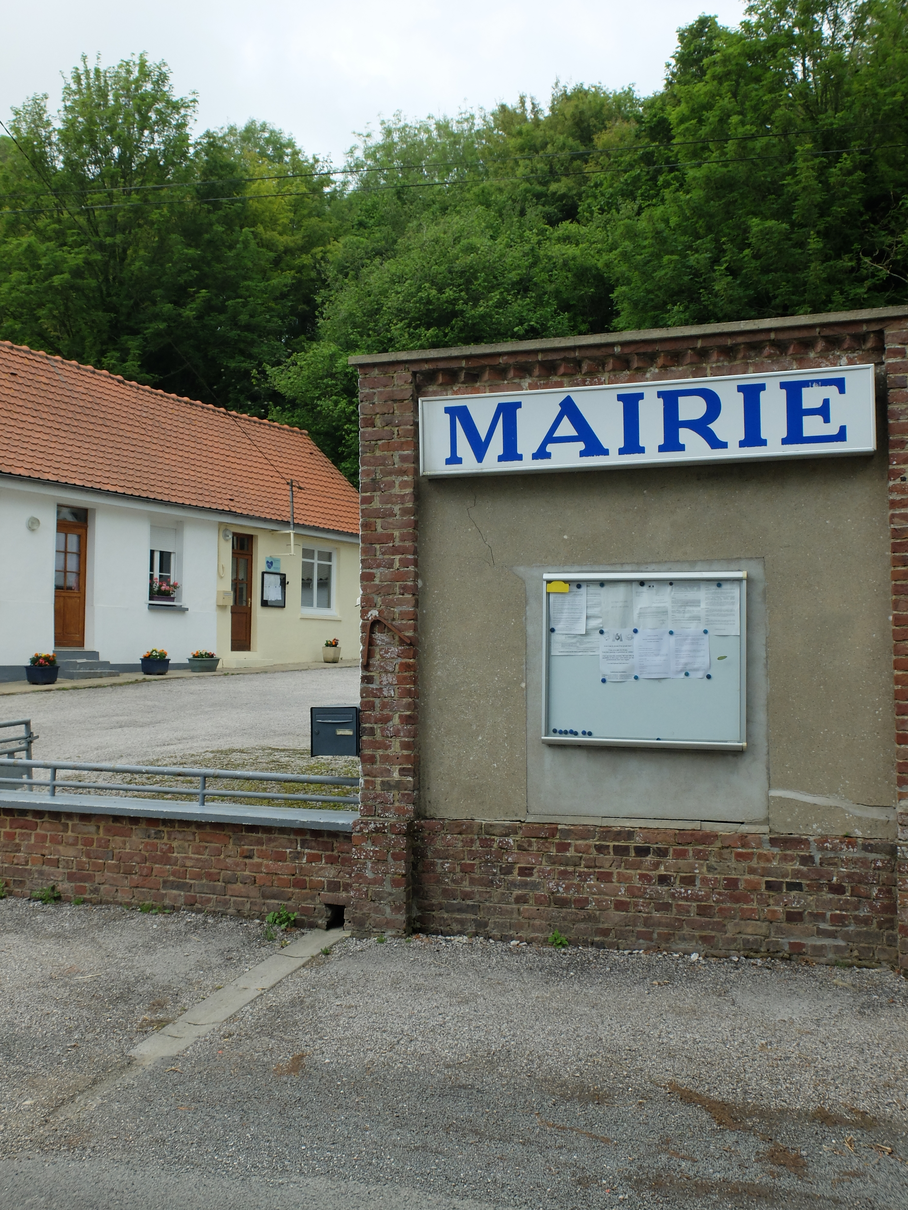 Vue de la mairie de Longueville (Pas-de-Calais).